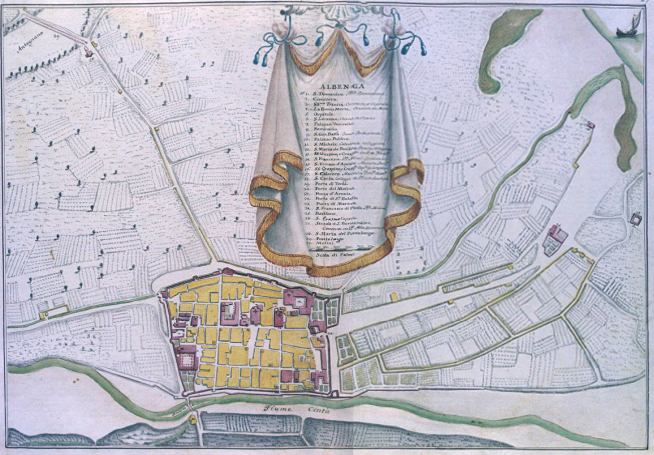 Immagine del 1773 realizzata da Matteo Vinzoni che testimonia l'urbanistica ingauna nel XVIII secolo